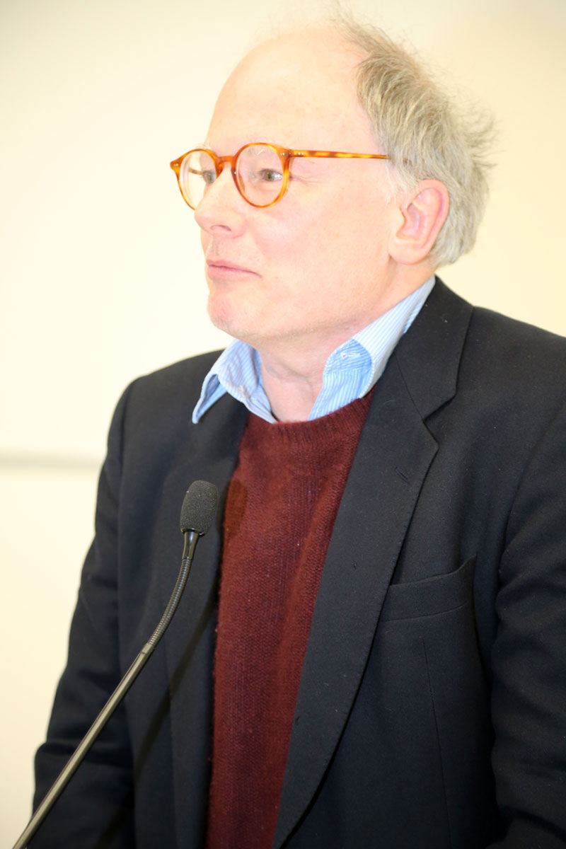 Franz Josef Czernin-5924